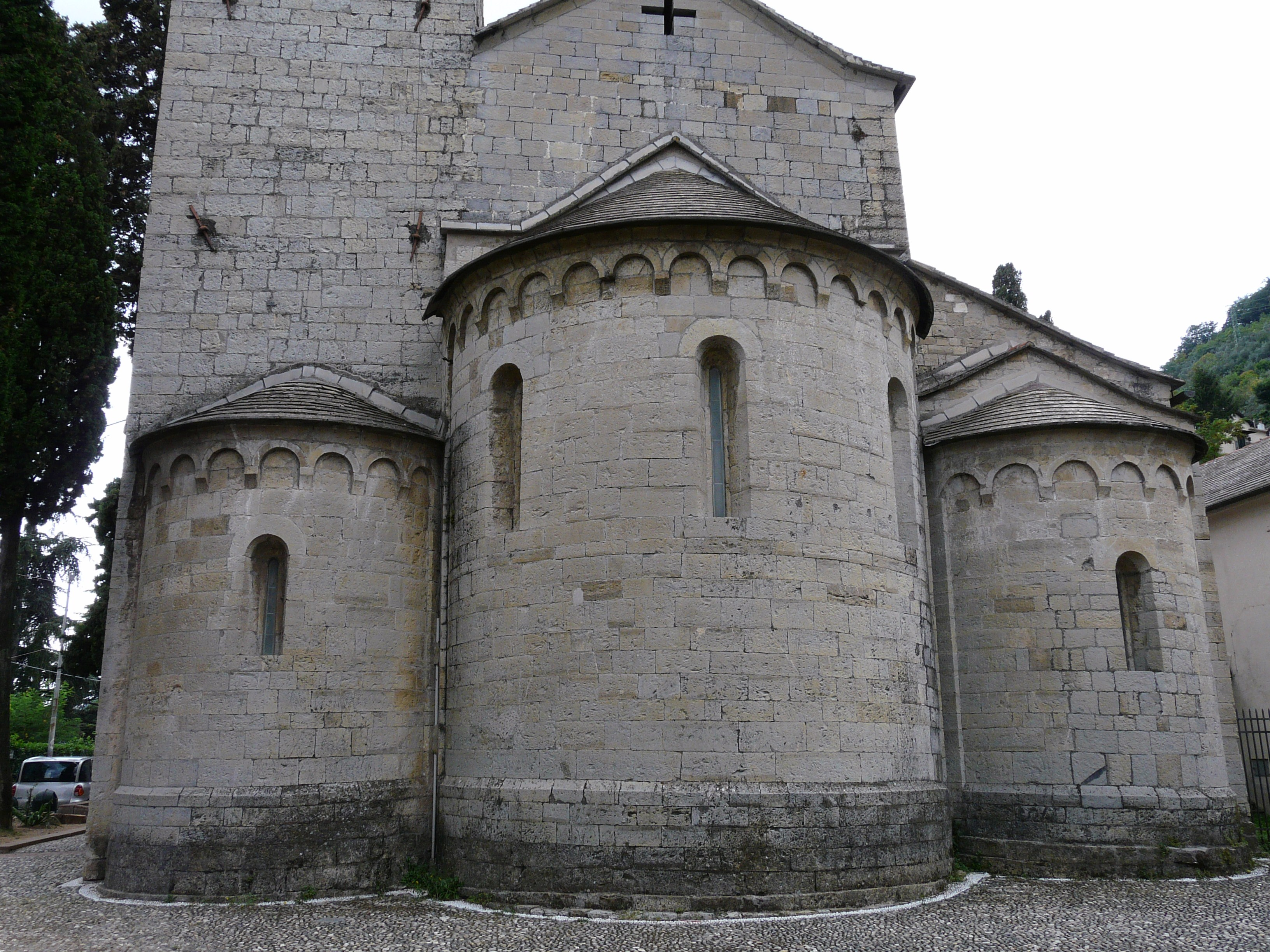 Abside della chiesa di San Siro di Struppa, Genova, Liguria, Italia